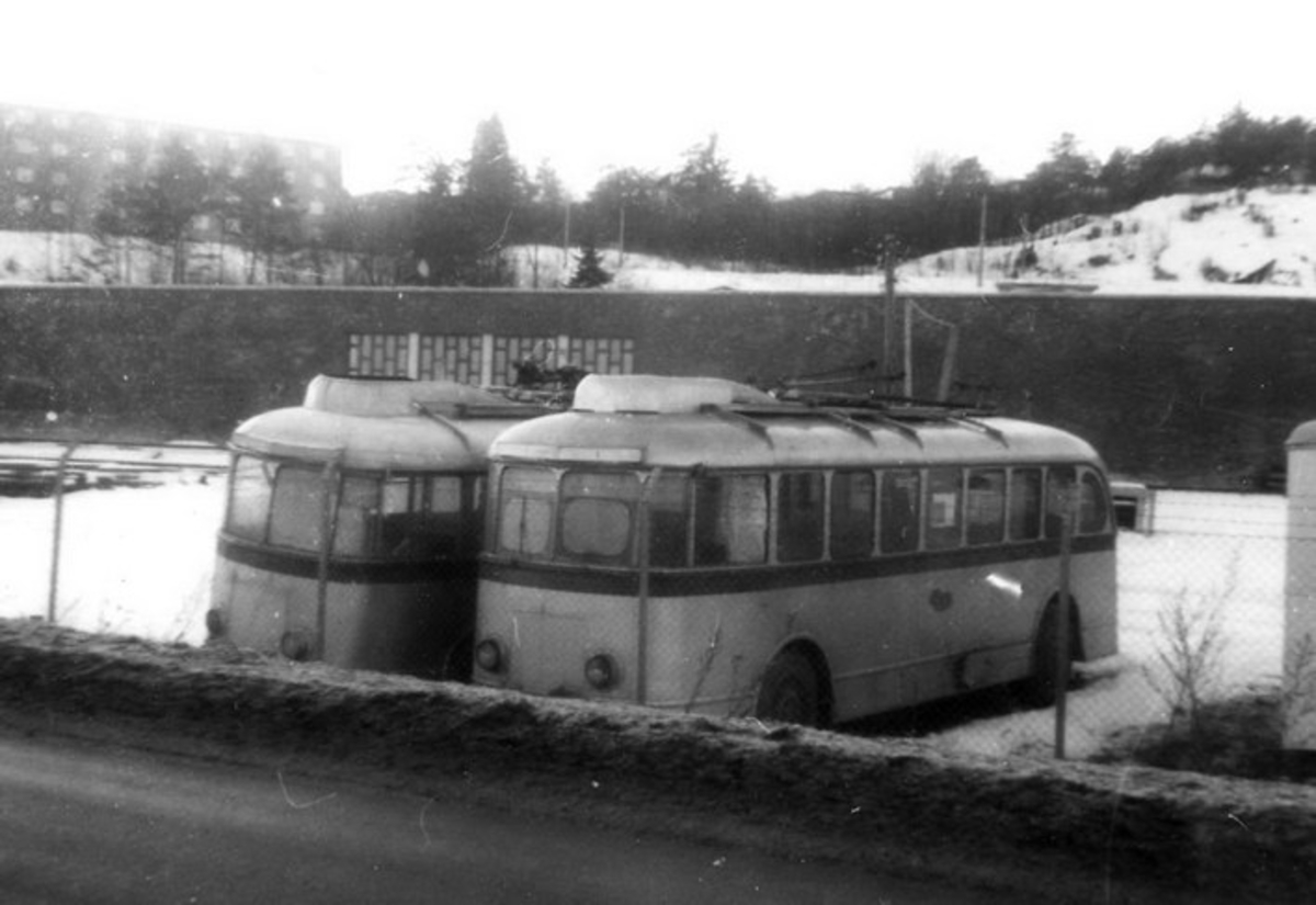 To trolleybusser fra Oslo Sporveier, avstilt for skroting ved Ryen vognhall, 1964